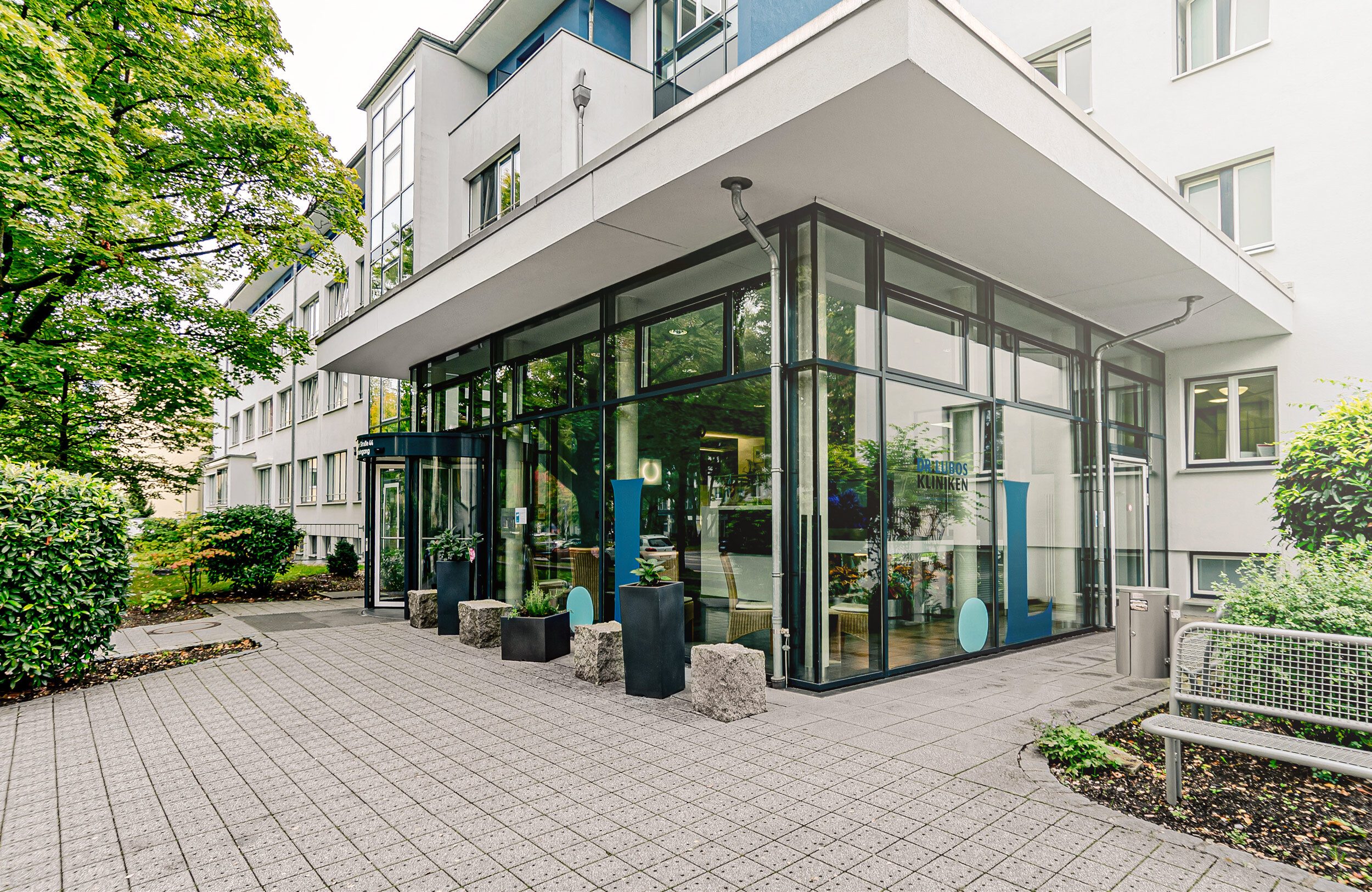 Außenaufnahme des Krankenhauses "Dr. Lubos Kliniken Bogenhausen" in München